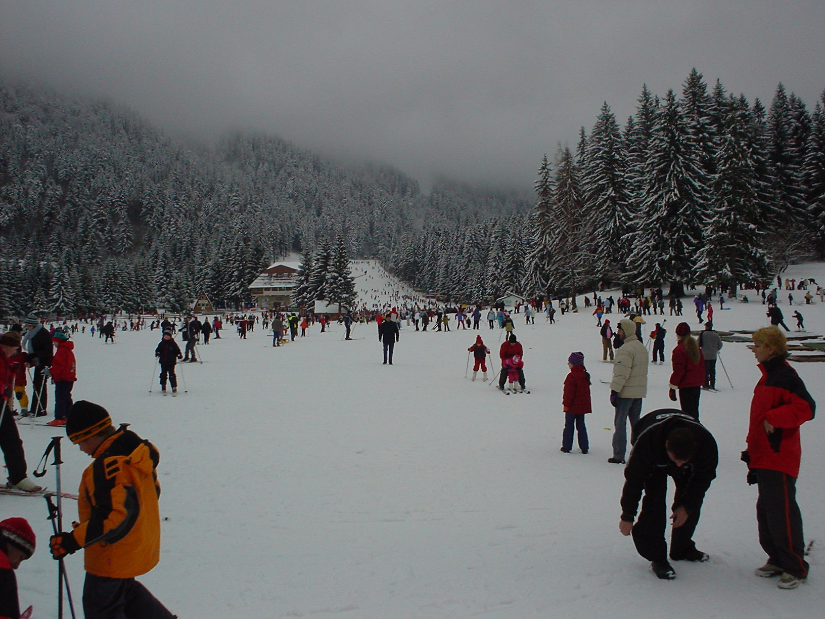 Горнолыжный спуск в Пояна-Брашов (Румыния)